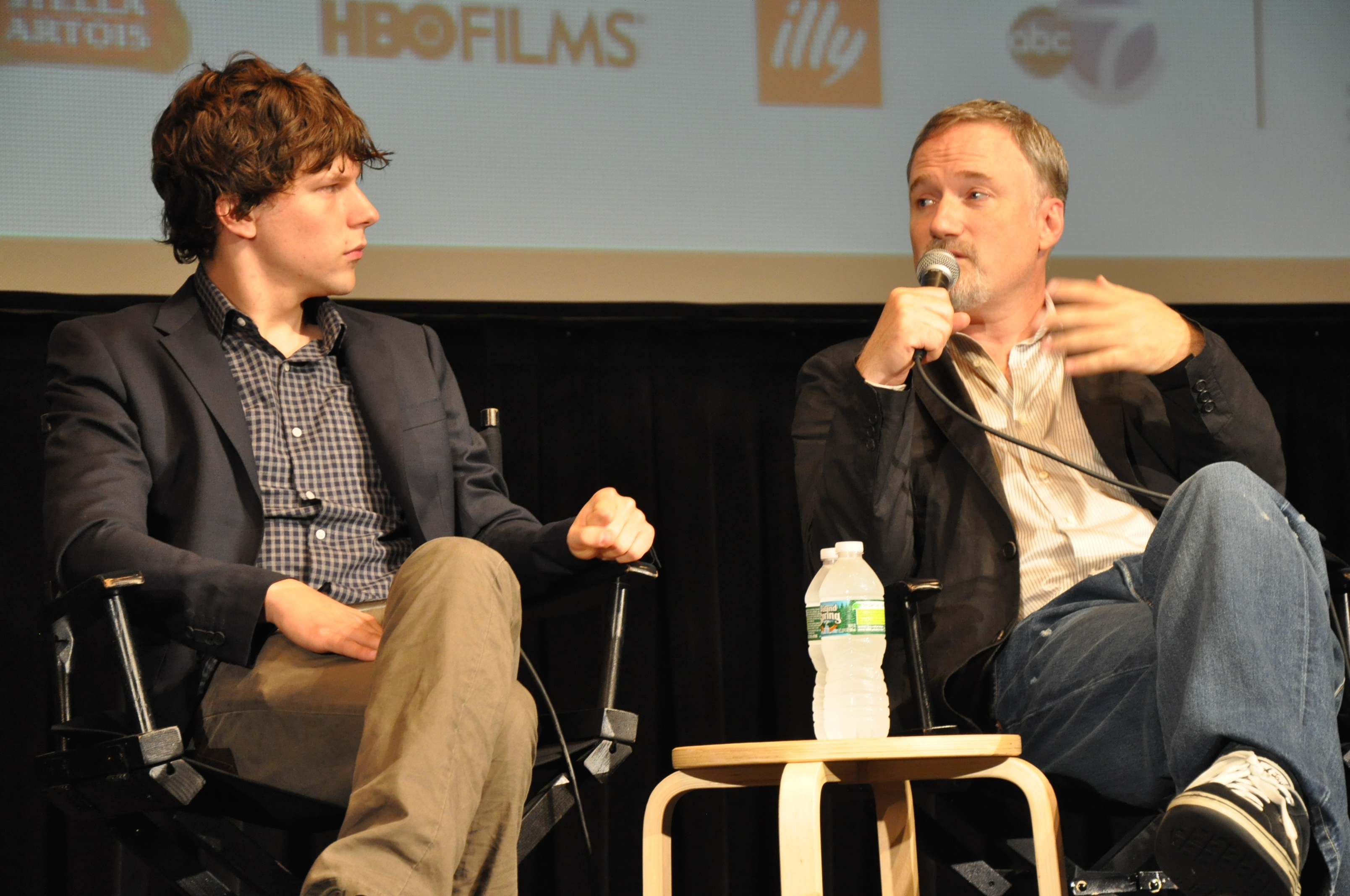 El actor Jesse Eisenberg junto al director de cine David Fincher en el estreno de The social network en el Festival de Cine de Nueva York. 24 de septiembre de 2010.